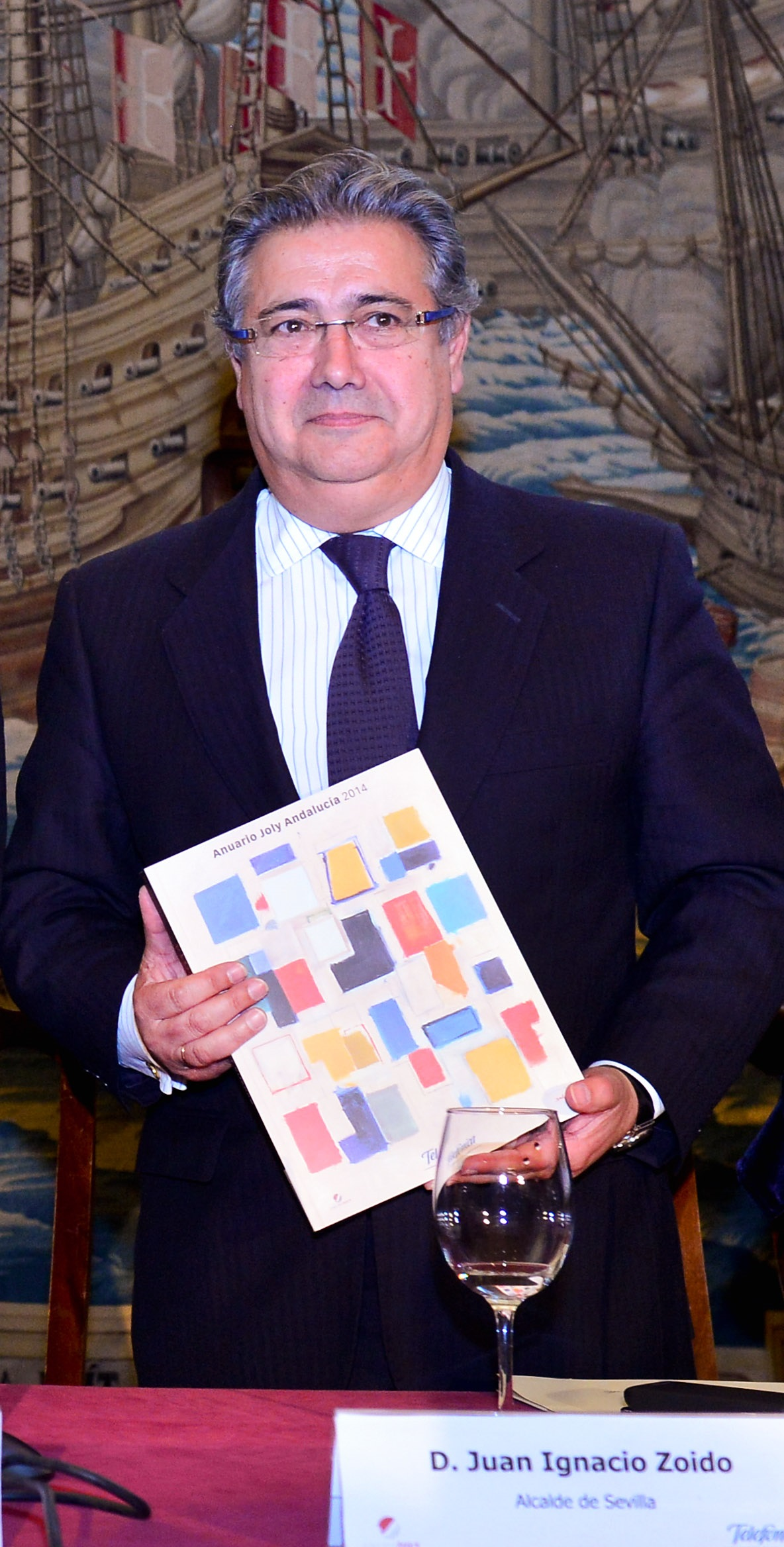 El alcalde de Sevilla, Juan Ignacio Zoido Álvarez, en la presentación del Anuario del Grupo Joly en 2014, que se realizó en el Salón de Tapices de los Reales Alcázares de Sevilla